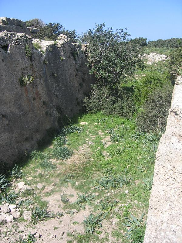 החפיר המזרחי של מבצר דטרוא. תמונה שצילמתי והעלתי במרץ 2006. אסף.צ 14:21, 3 מרץ 2006 (UTC)